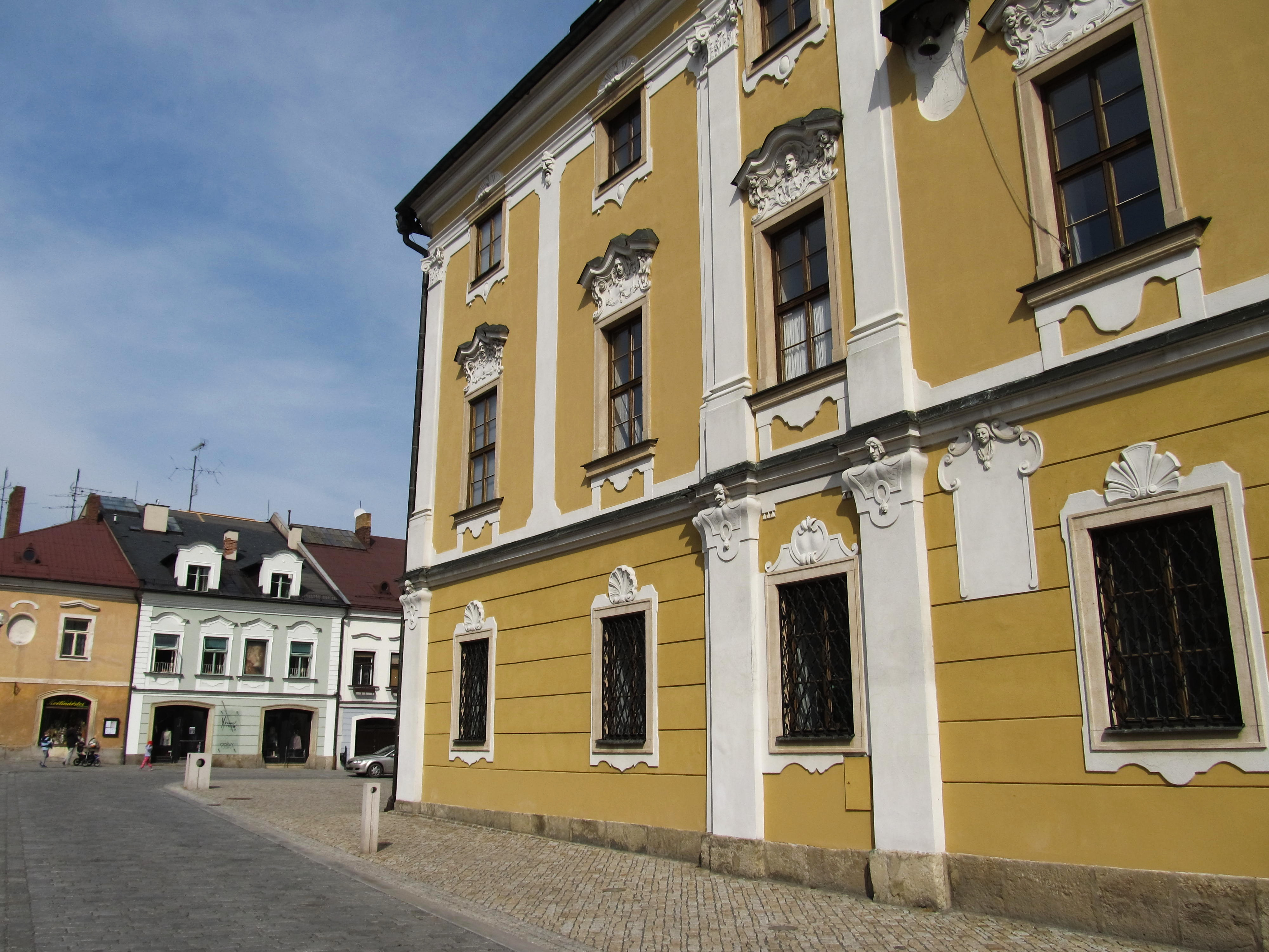 Západní průčelí radnice na Palackého náměstí